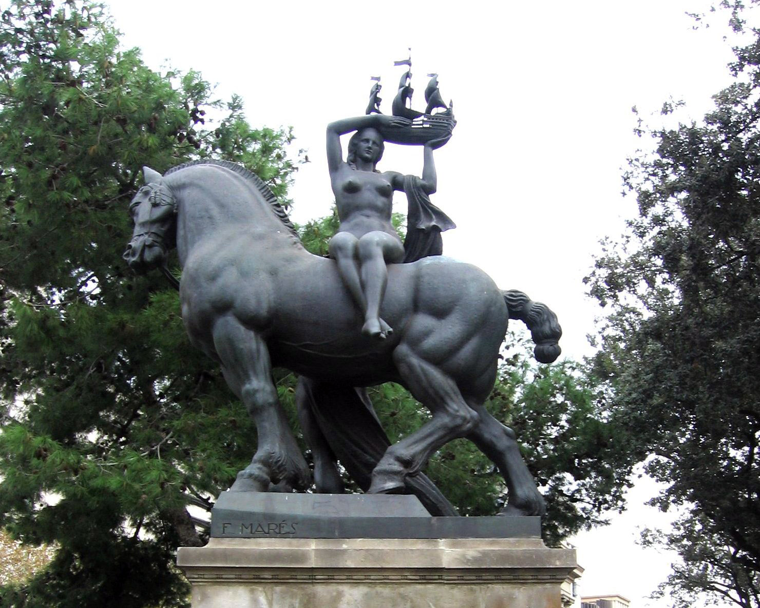 Barcelona (Frederic Marès).